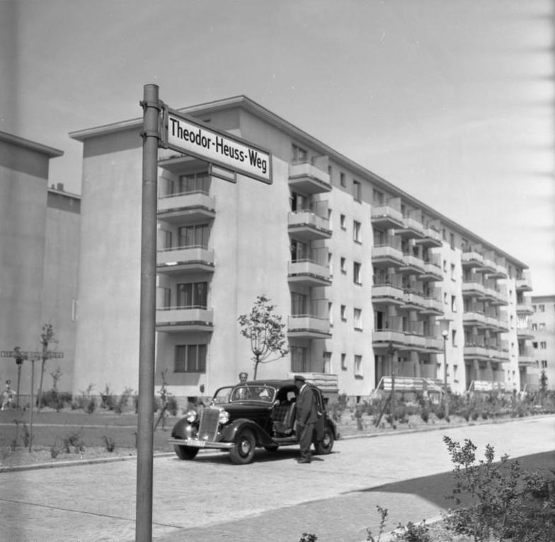 Stadtaufnahmen Berlin